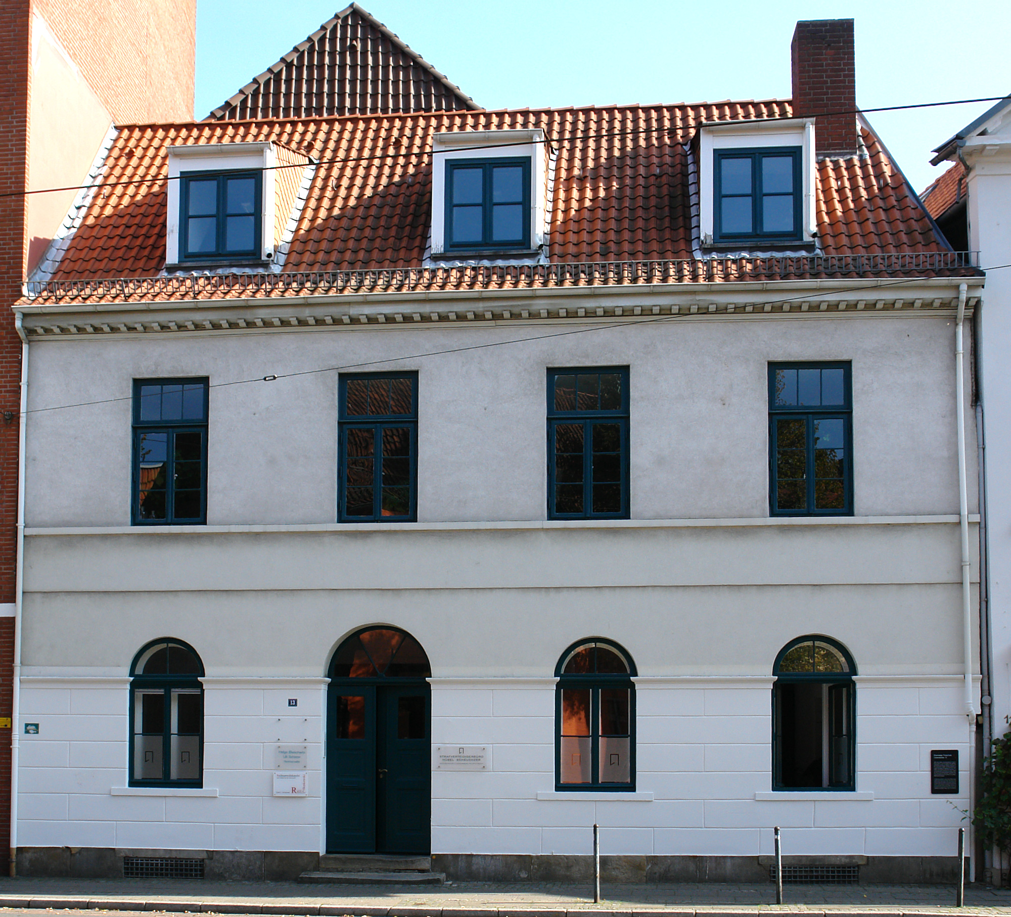 Freischule in Bremen, Violenstraße 13.Das abgebildete Objekt ist ein geschütztes Kulturdenkmal in der Freien Hansestadt Bremen, mit der Nr. 1189 beim Landesamt für Denkmalpflege registriert.